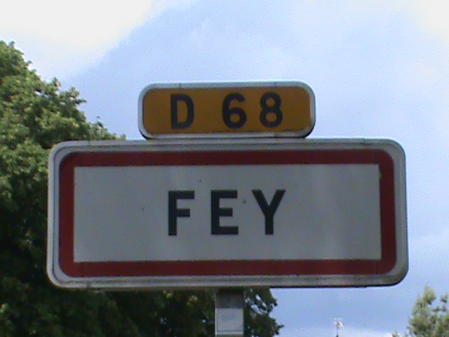 Panneau d'entrée d'agglomération du village Féy